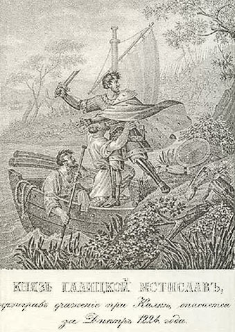 Князь Галицкий Мстислав в битве на Калке, 1223